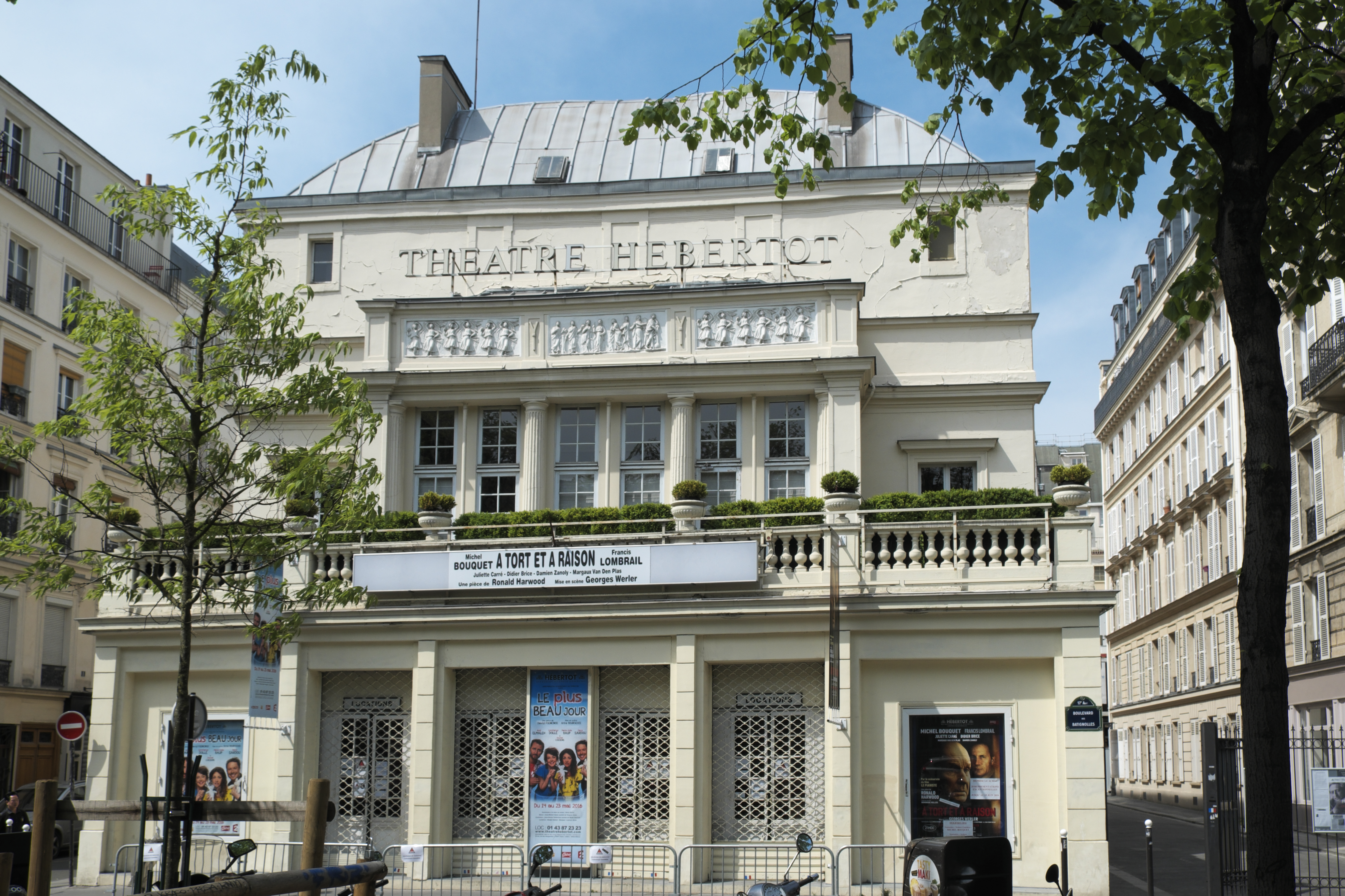 Théâtre Hébertot am Boulevard des Batignolles im 17. Arrondissement in Paris (Île-de-France/Frankreich)